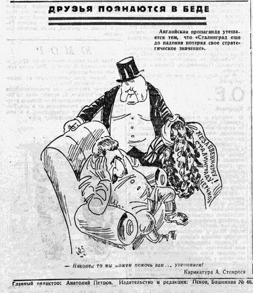 Карикатура Анатолия Стенроса (Макриди) в оккупационной немецкой двуцветной газете «За родину» (Псков), выходившей с осени 1942 года до лета 1944 года на территории оккупированной России.